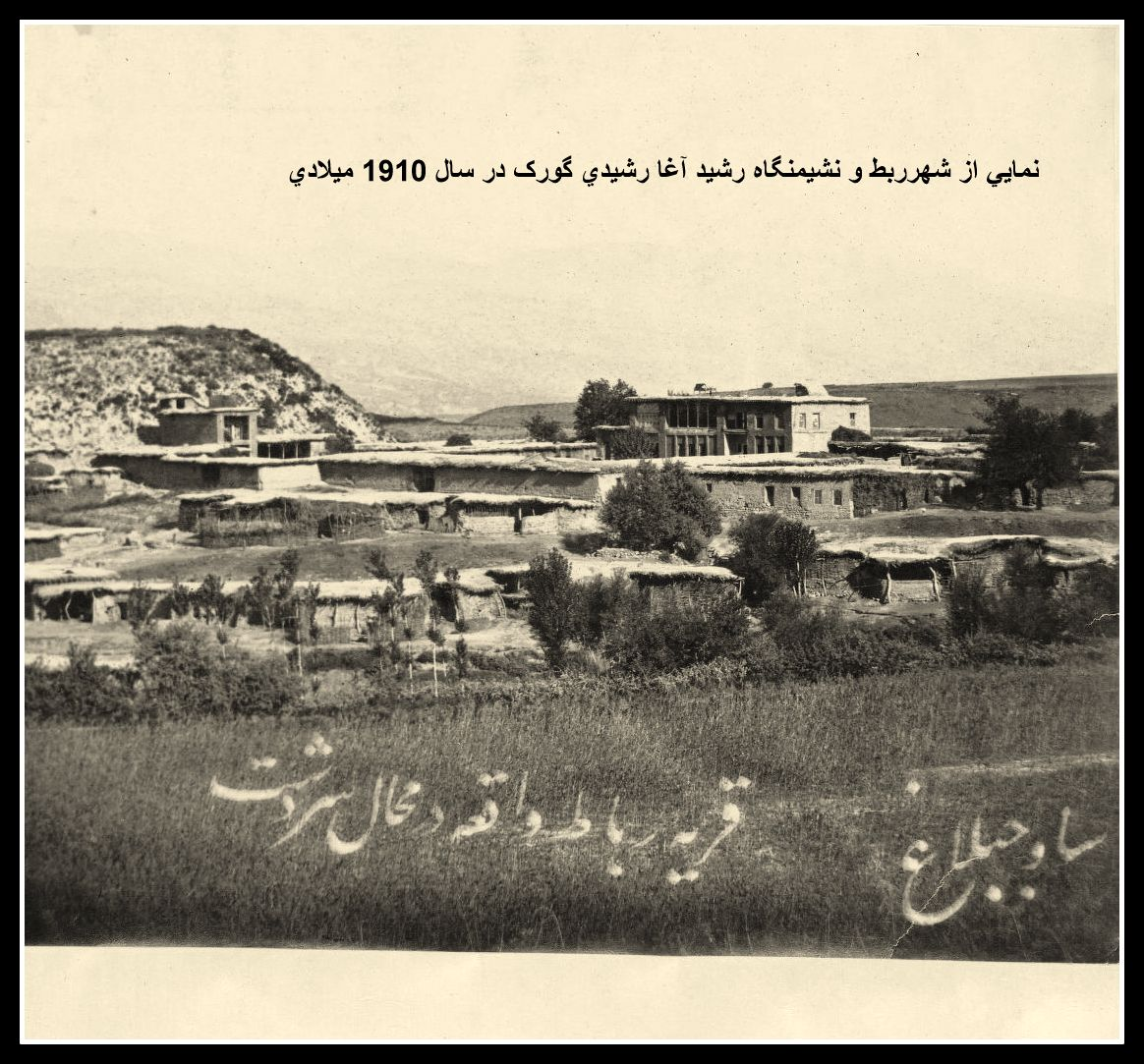 نمایی از ربط و منزلگاه رشیدآغا گورک Gawerk- Kurdistan -Rabat house of rashid agha - 1900